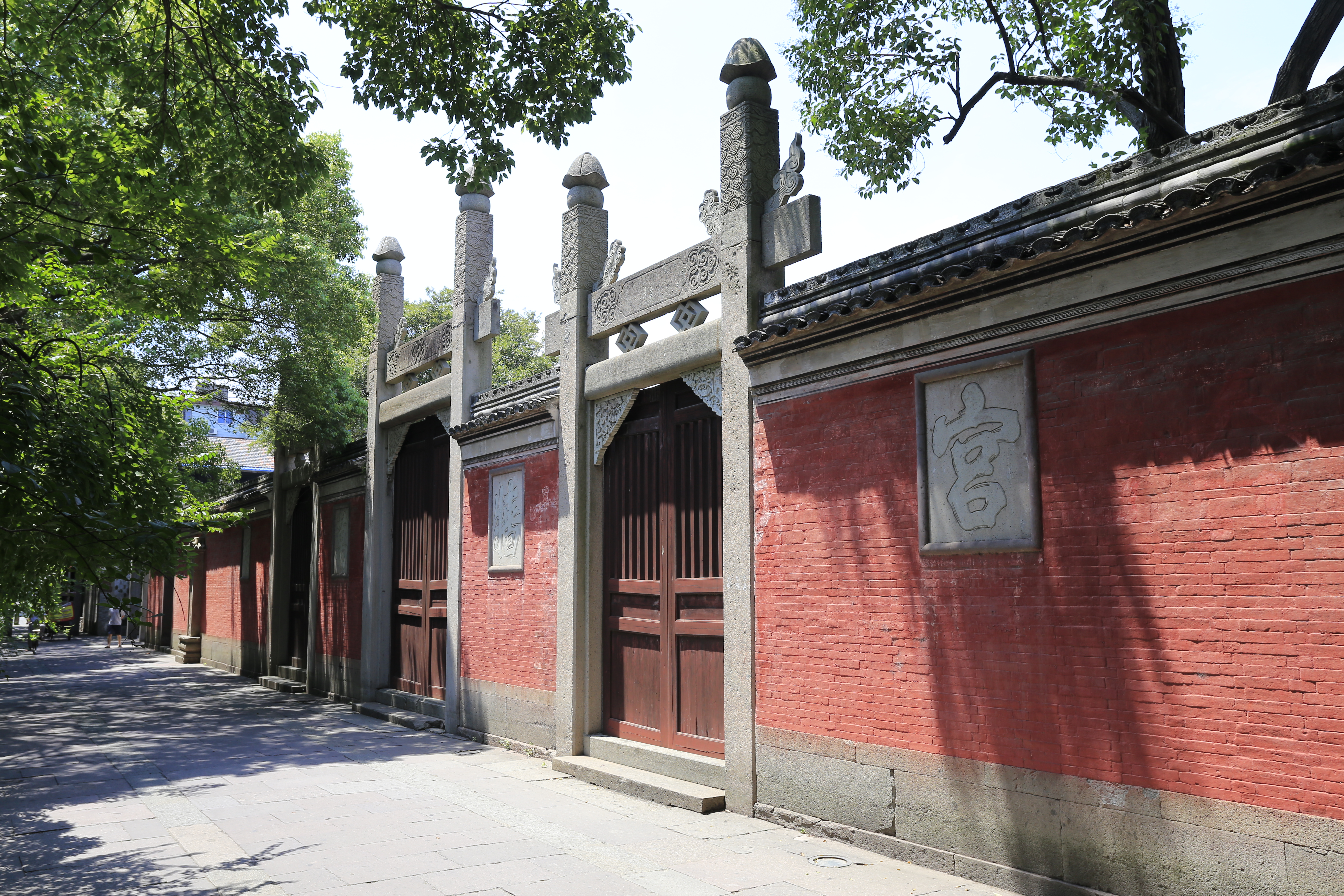 宁波市慈城孔庙 —— 棂星门